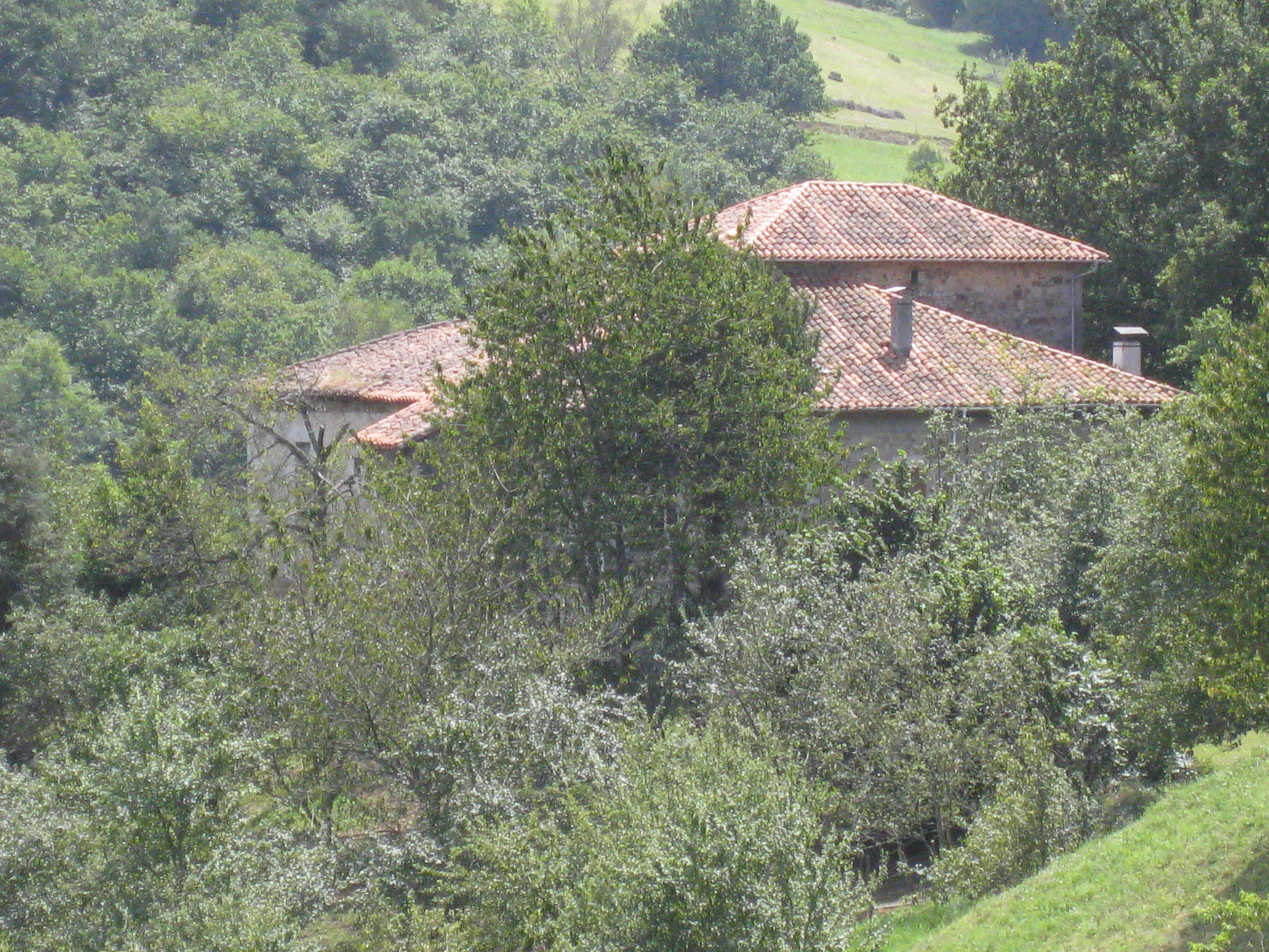 Palacio de Díaz Iguanzo, Berodia, concejo de Cabrales, Asturias.